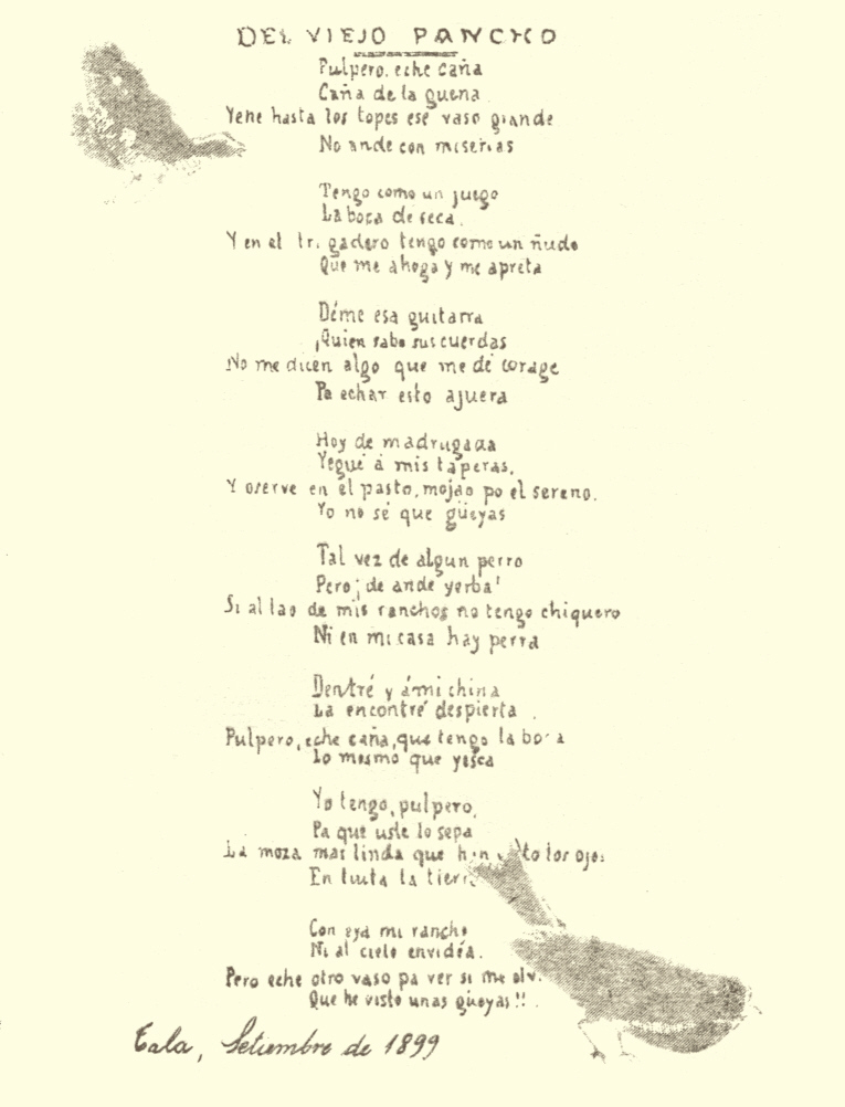 Manuscrito original de "La güeya" del escritor uruguayo José Alonso y Trelles (1857 - 1924).